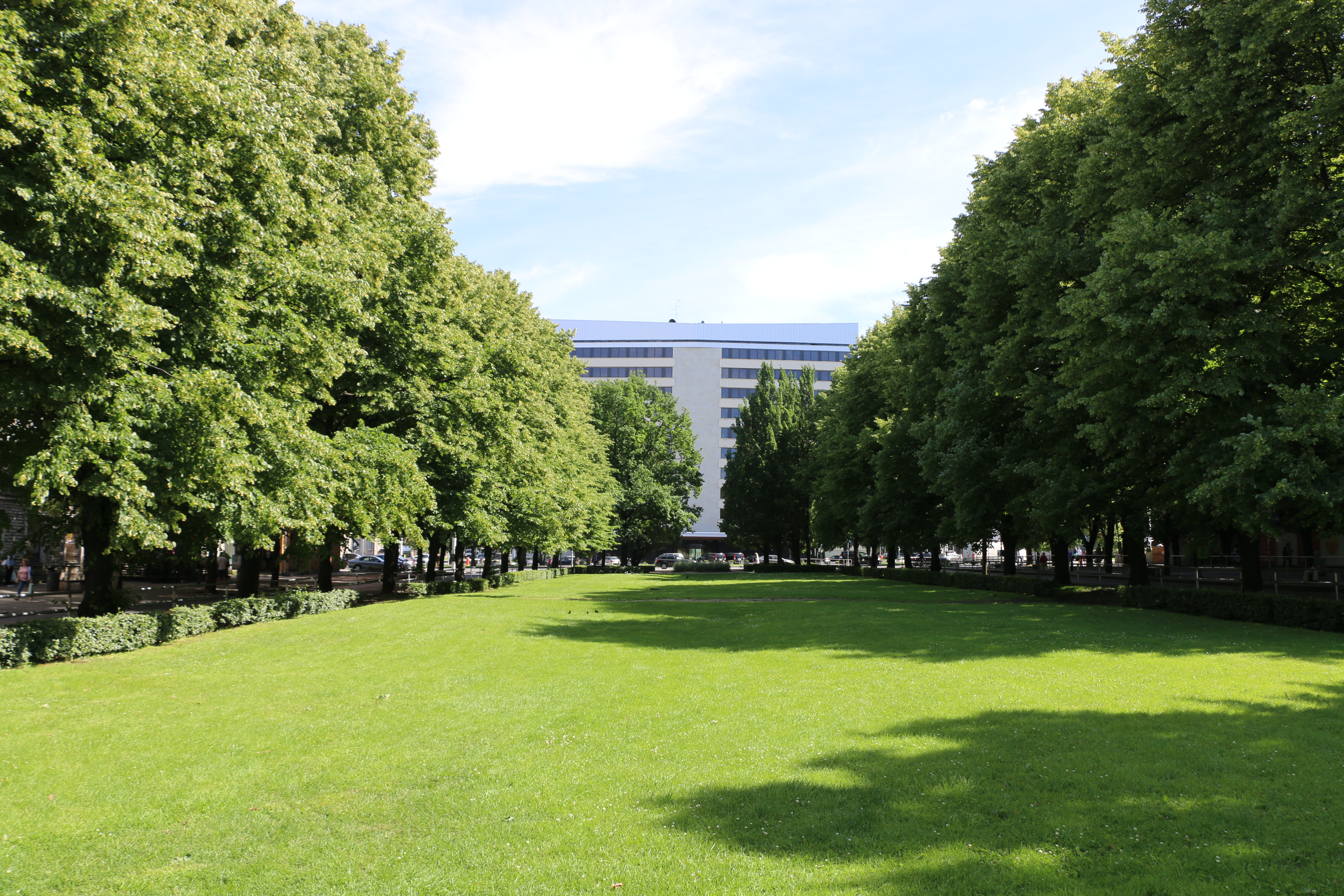 Teatri väljak Estonia poolt